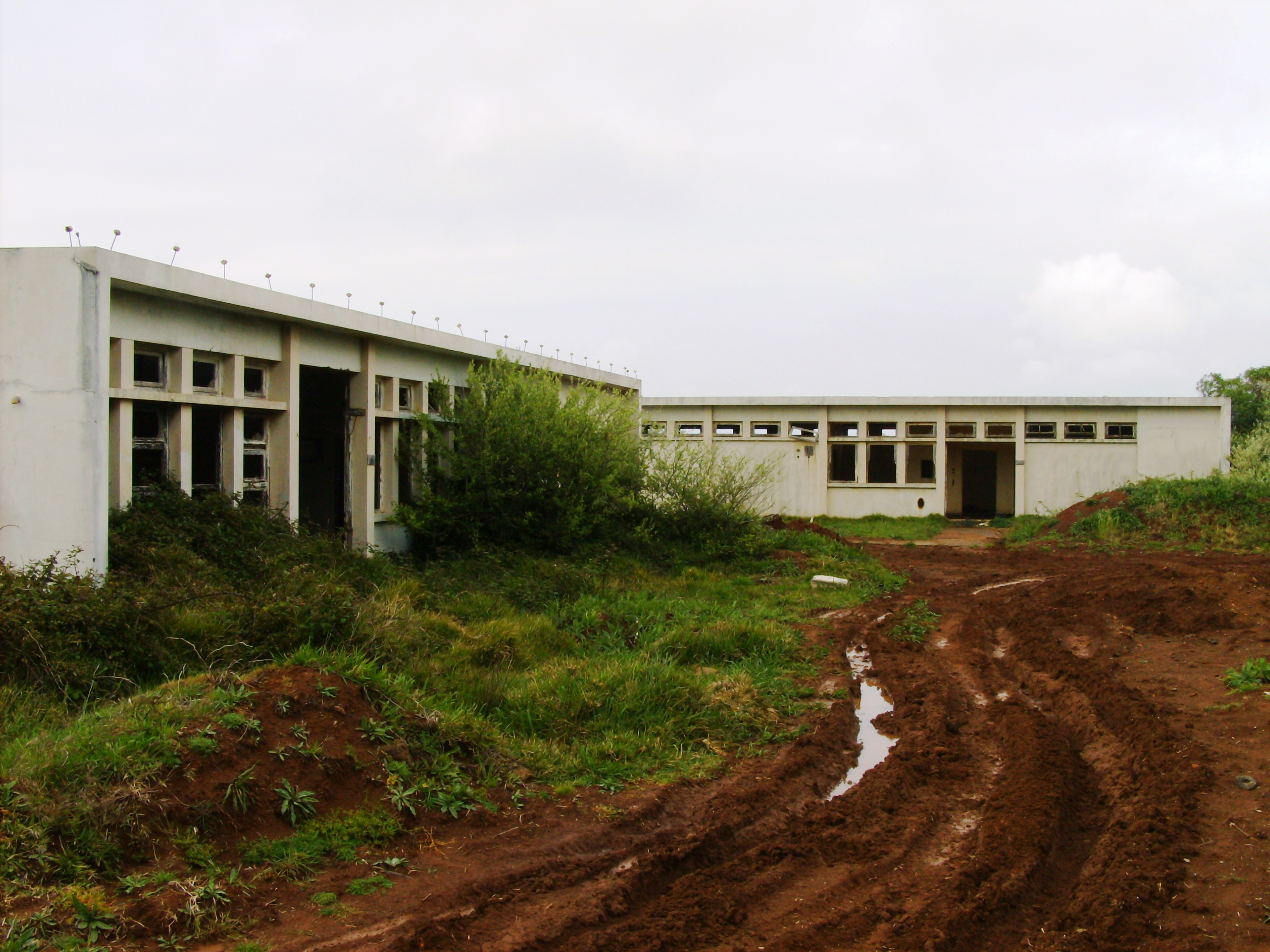 Estação LORAN de Santa Maria, Ilha de Santa Maria (Açores), Portugal.